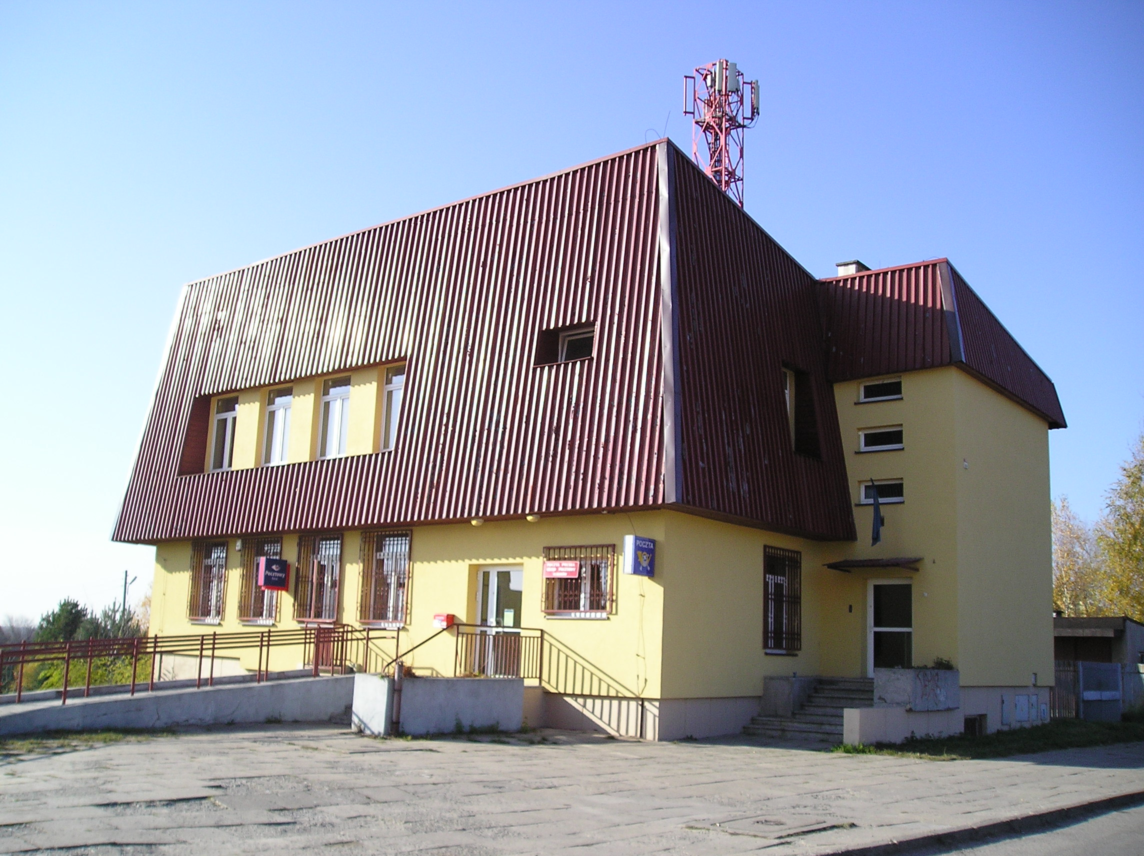 Budynek poczty w Sławkowie (woj. śląskie)